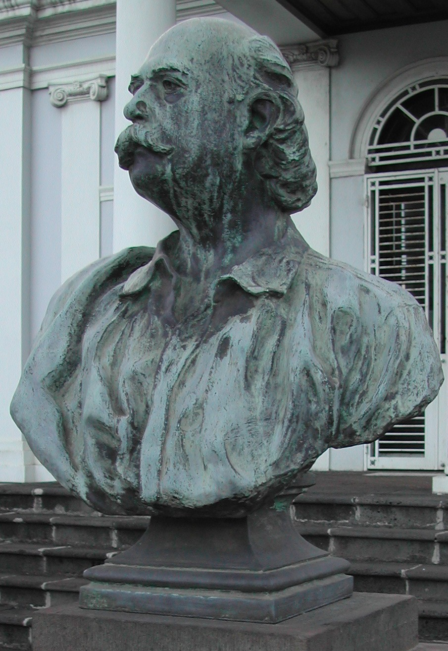 Photo d'un buste de Léon Dierx à l'entrée du musée portant son nom à Saint-Denis de la Réunion.